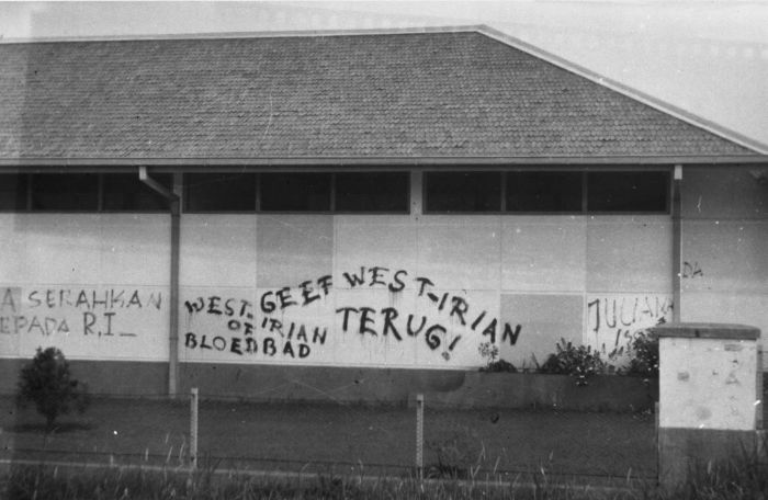 Foto. Leuzen tegen de aanwezigheid van Nederland in Nieuw-Guinea op de muren van een loods in Kebajoran